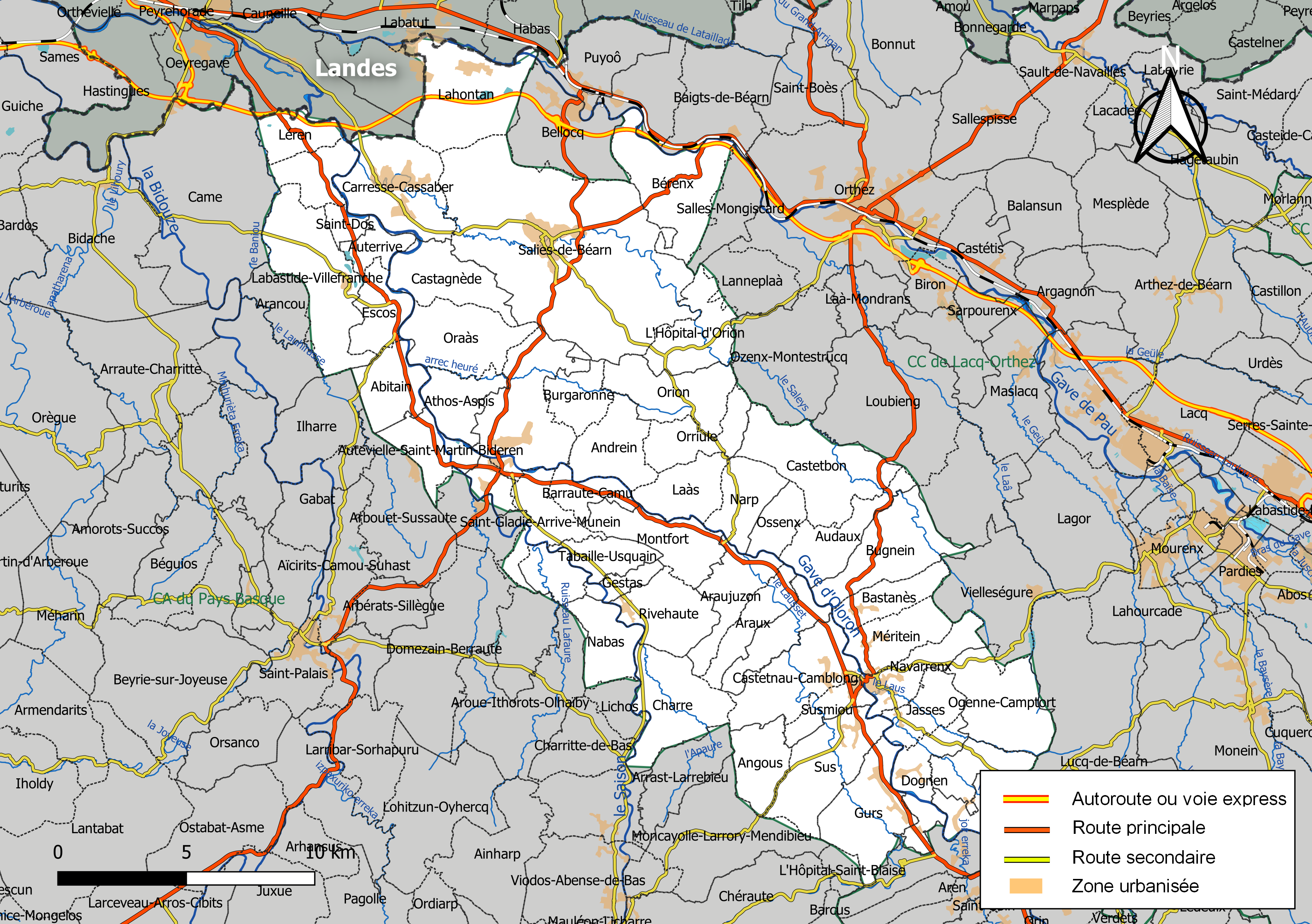 Carte géographique de la Communauté de communes du Béarn des Gaves, département des Pyrénées-Atlantiques, France. Composition au 1er janvier 2019.